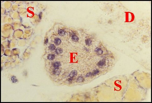 Ilôt de tissu endocrinoïde chez un mâle de Mastophora cornigera